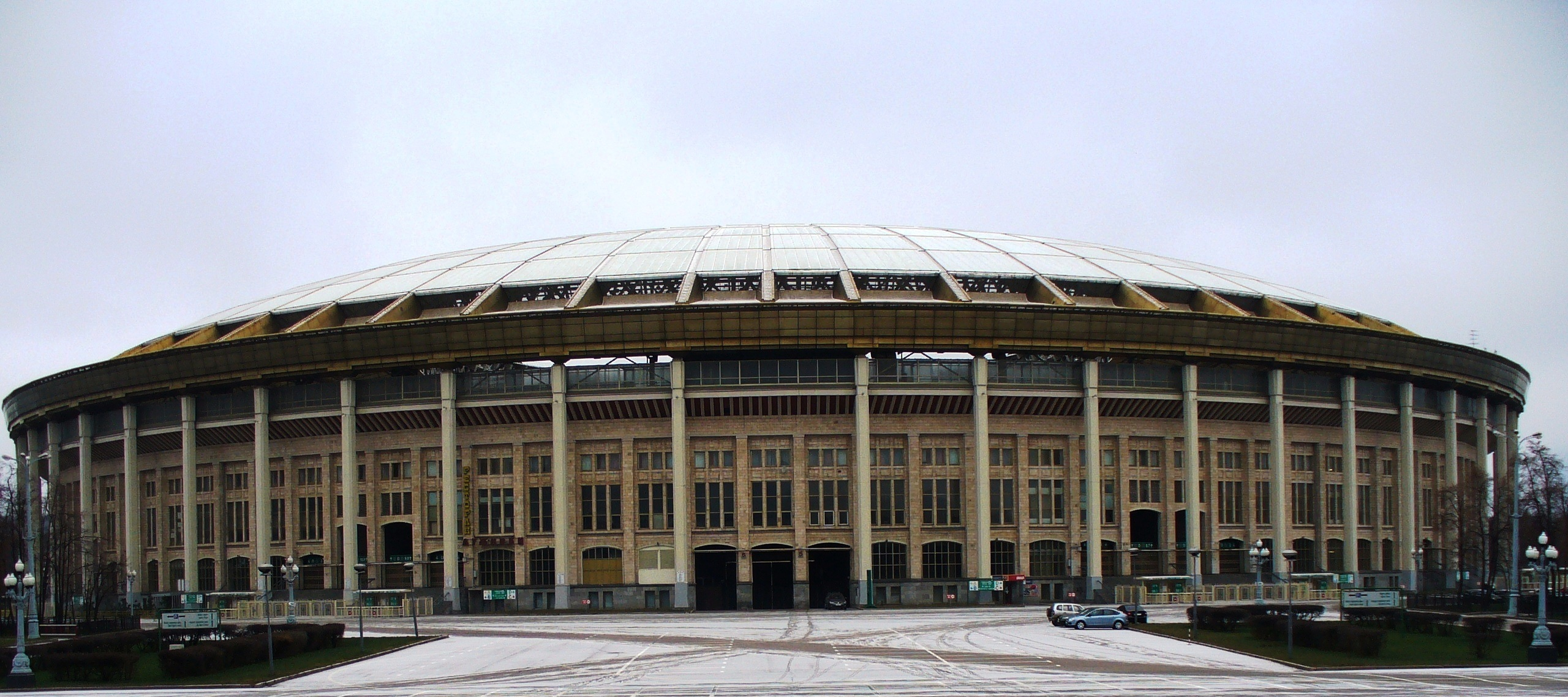 Спортивный комплекс Лужники. Большая спортивная арена